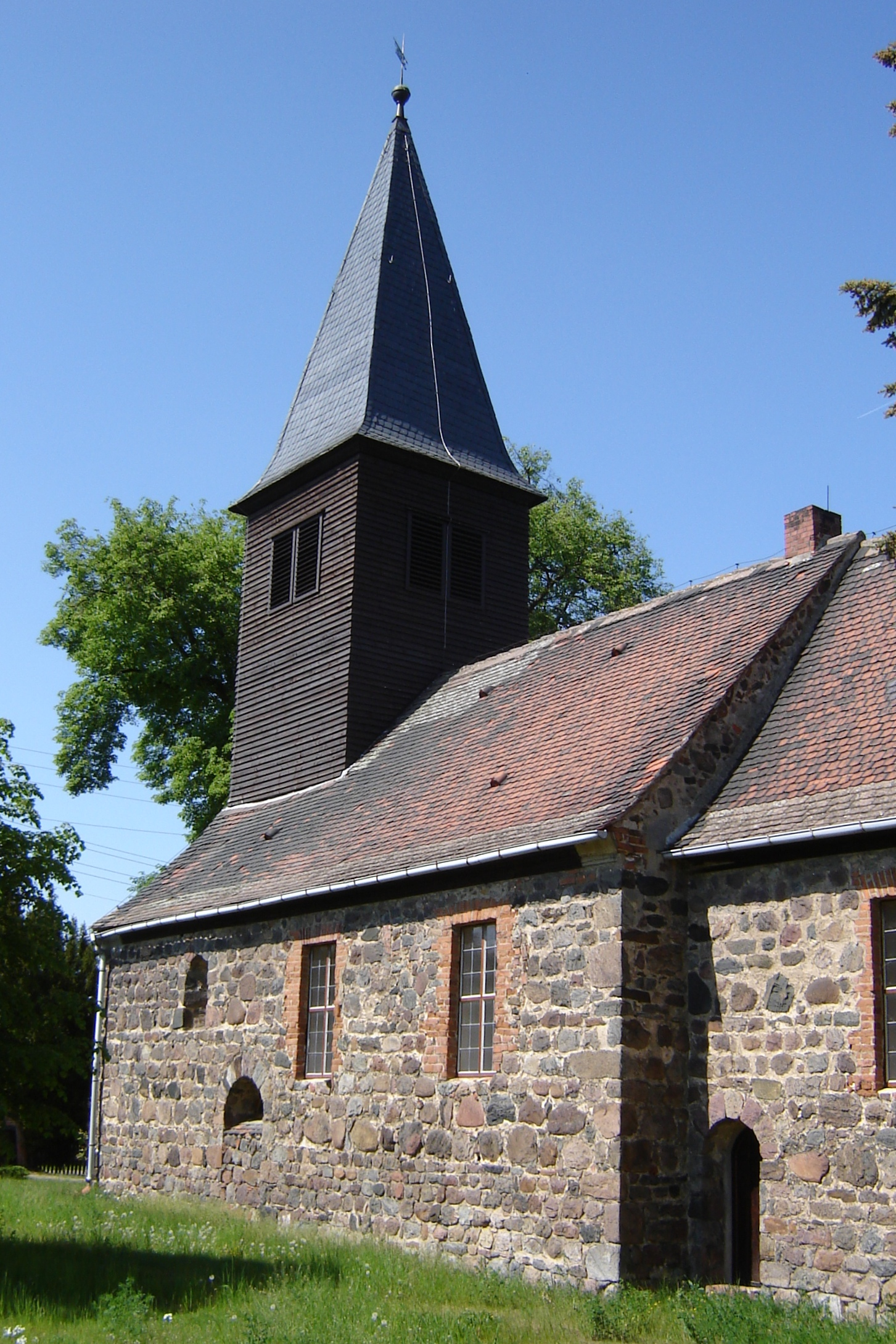 Tryppehna, Sachsen-Anhalt, St. Marien-Kirche